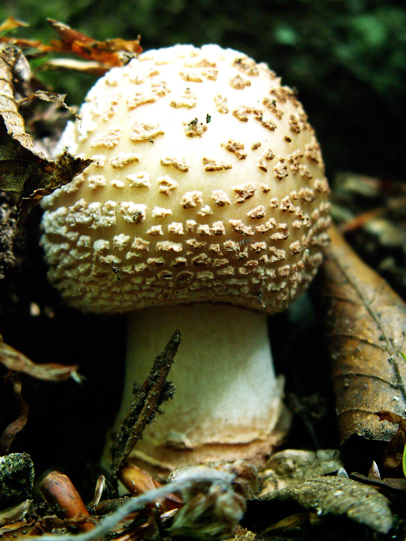 Amanita rubescens